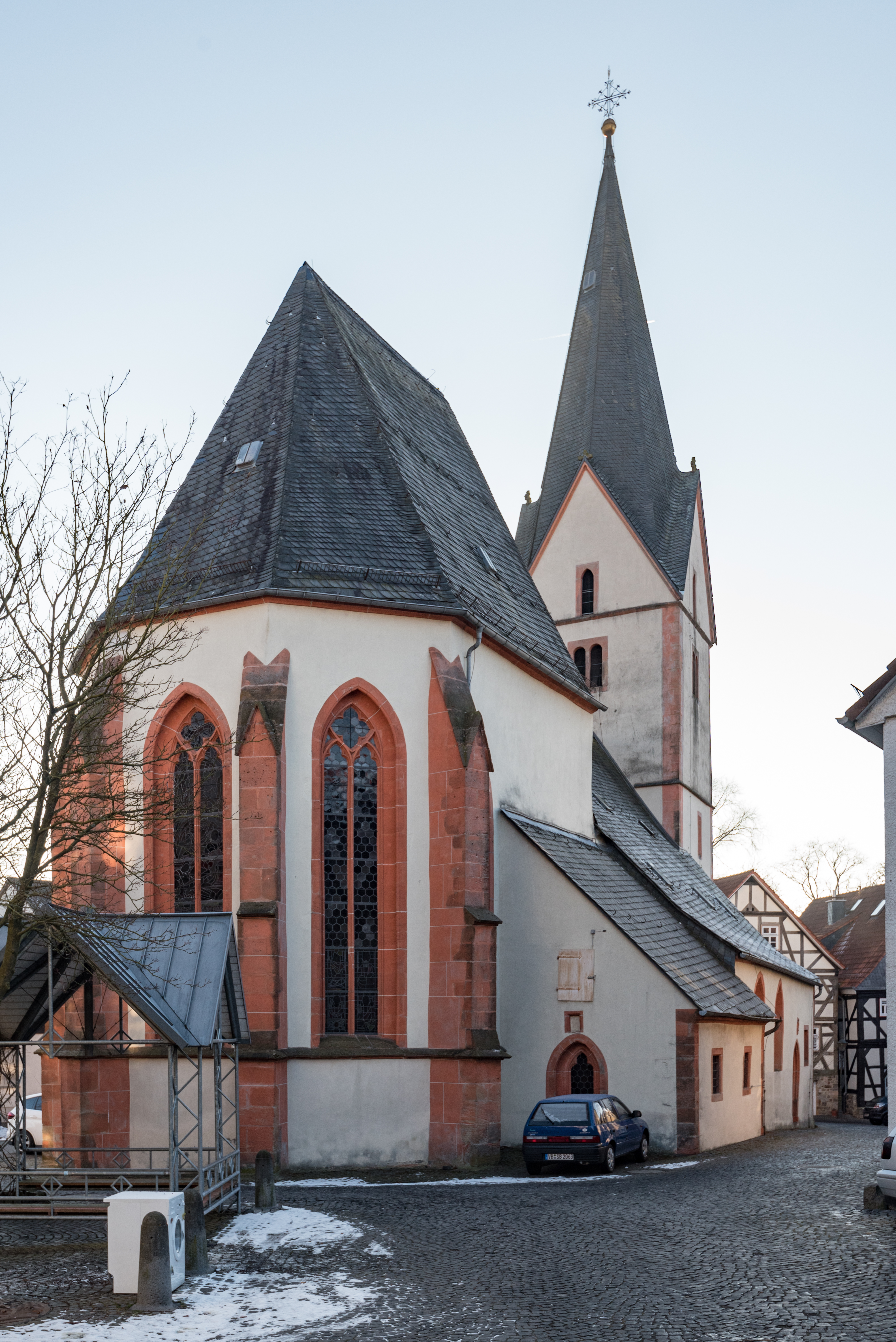 Homberg (Ohm), An der Stadtkirche 11, Ev. Stadtkirche